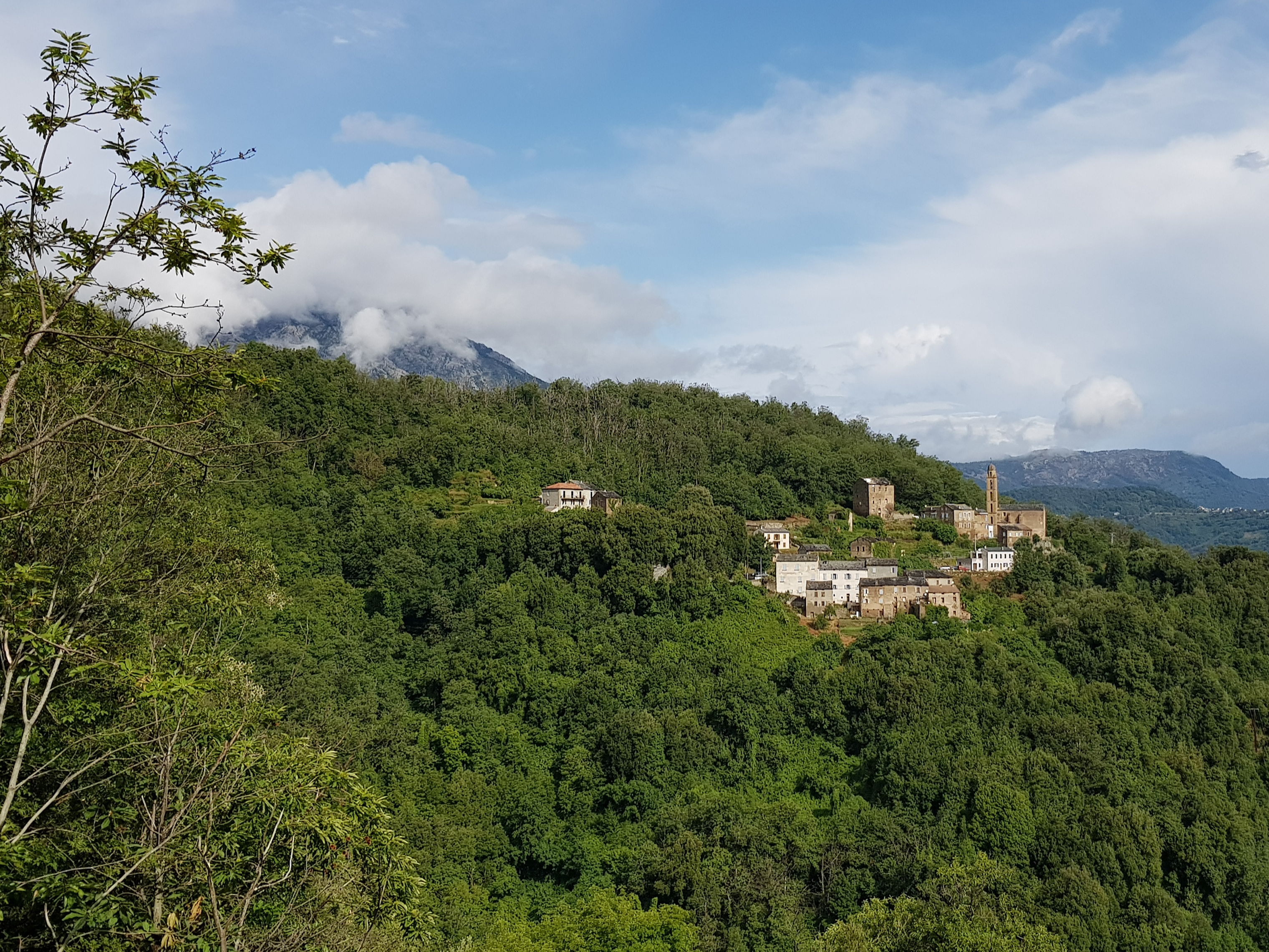 Vue générale du village